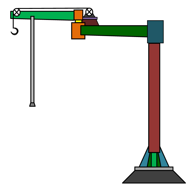 Консольный двухплечевой колонный консольный кран - мой чертёж